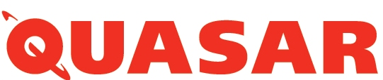 Logo Q-Zar / Quasar